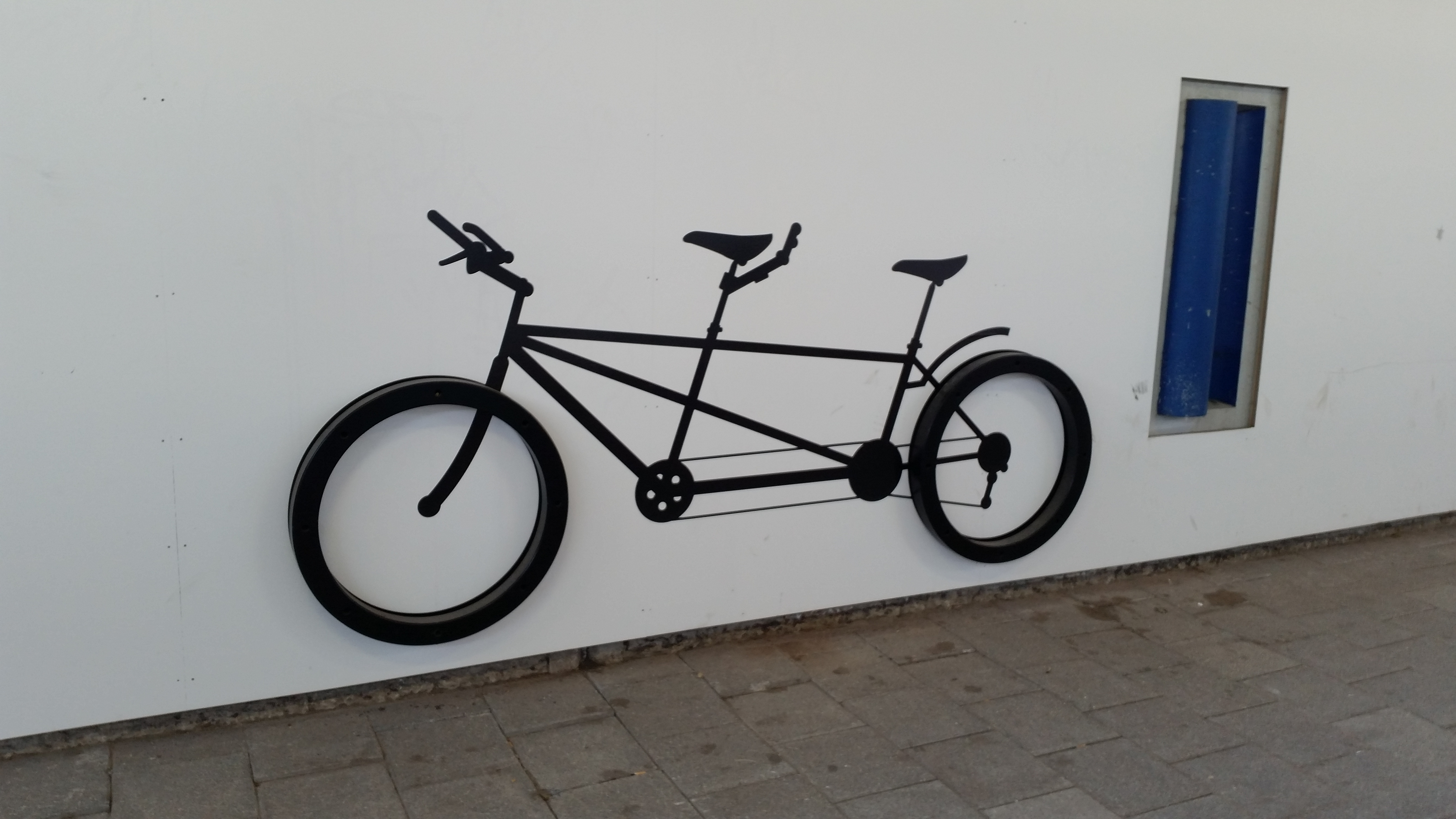 Zonder titel (Lies Hansen)